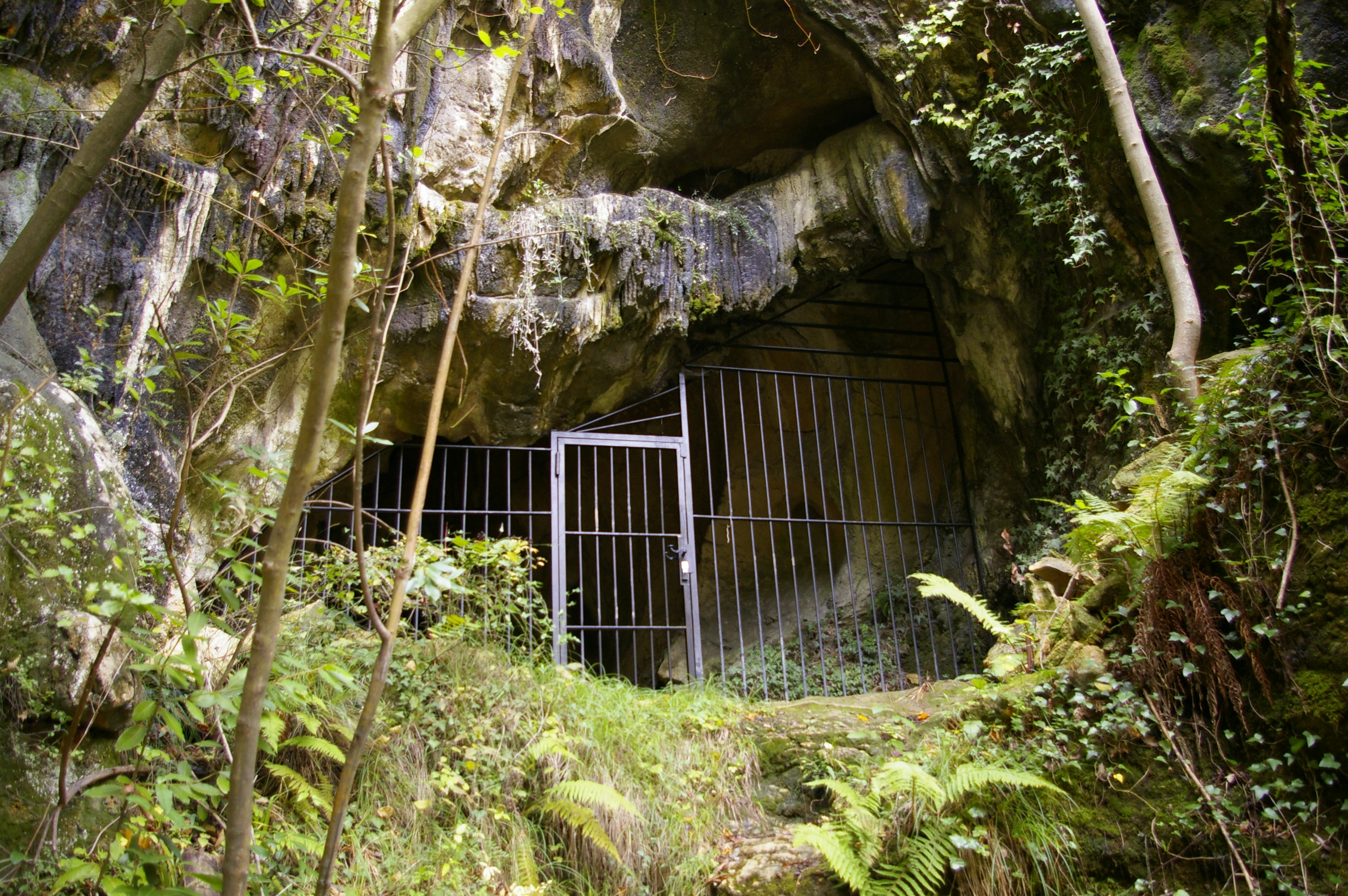 Askondoko kobaren sarrera Mañariko Urkioleta auzoan (Bizkaia)